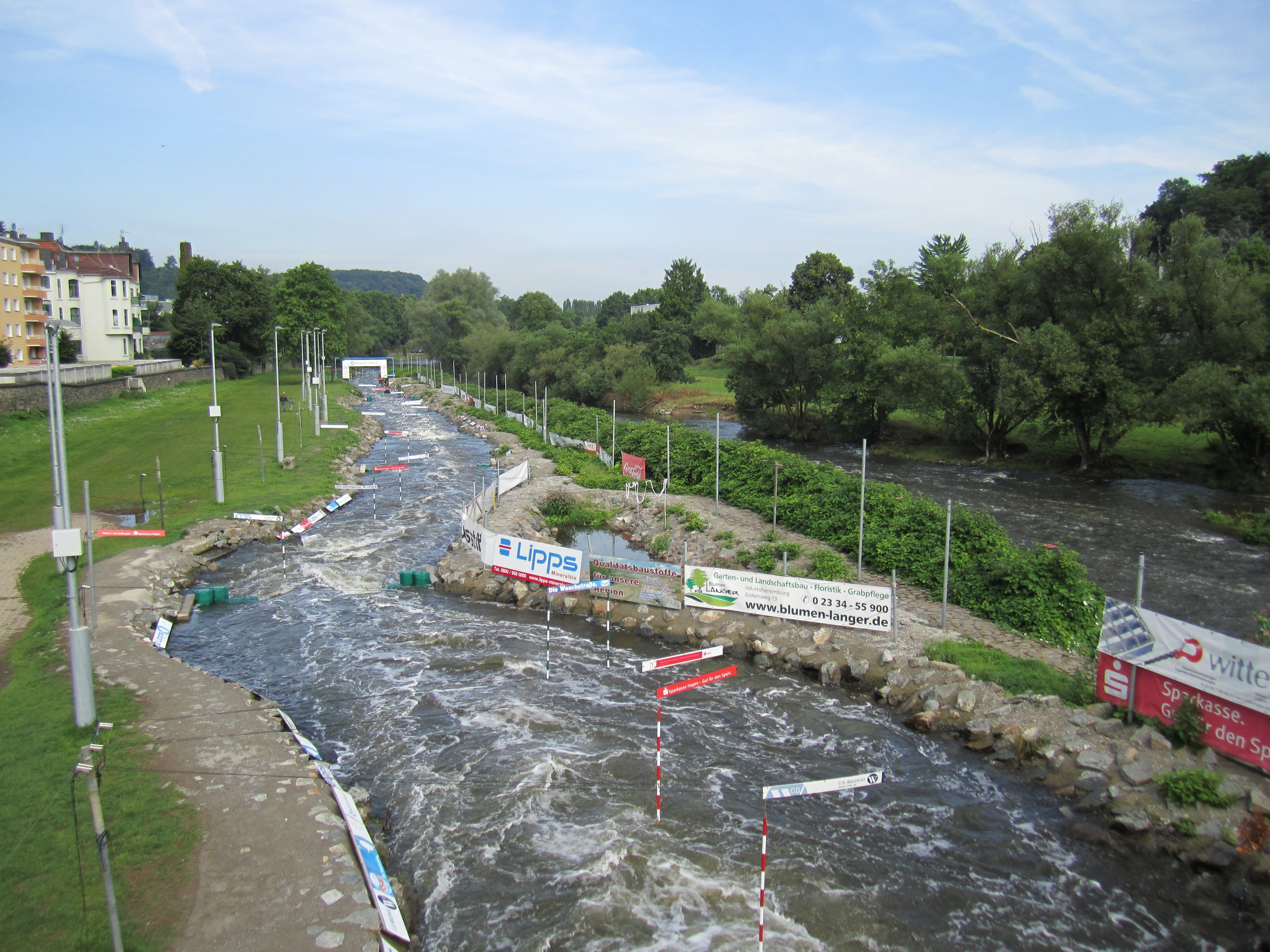 Wildwasserpark nach Umbau und Neueröffnung 2015 im Hagener Stadtteil Hohenlimburg. Aufgenommen von der Stennertbrücke Lenneabwärts zum Zieleinlauf. Auf 300 Metern gibt es im Wildwasserpark drei Meter Gefälle.